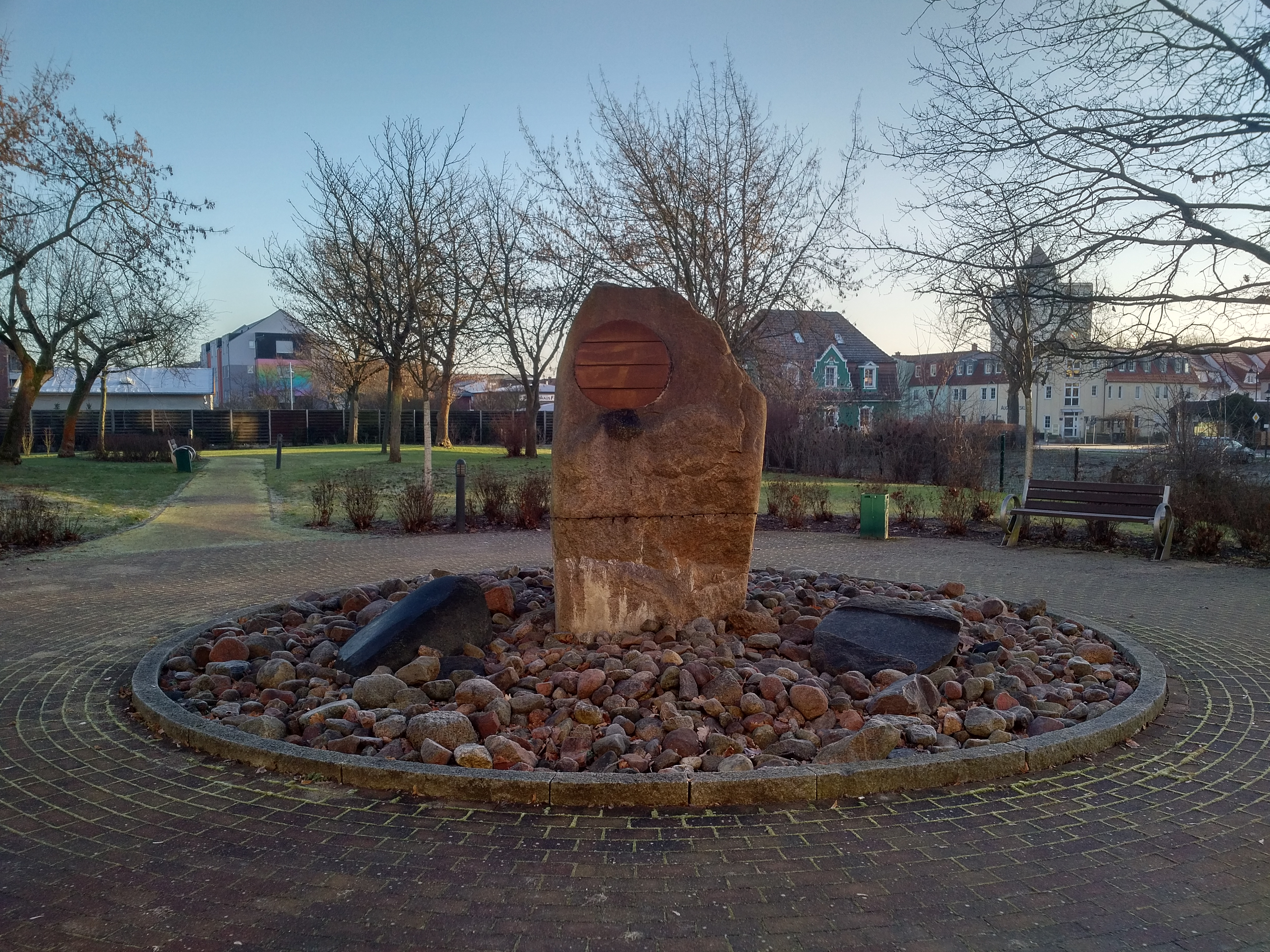 Asklepios Klinikum Uckermark, Schwedt/Oder - Jörg Steinert: Kreislauf des Lebens, Brunnen aus Naturstein, 2003; im Patientengarten